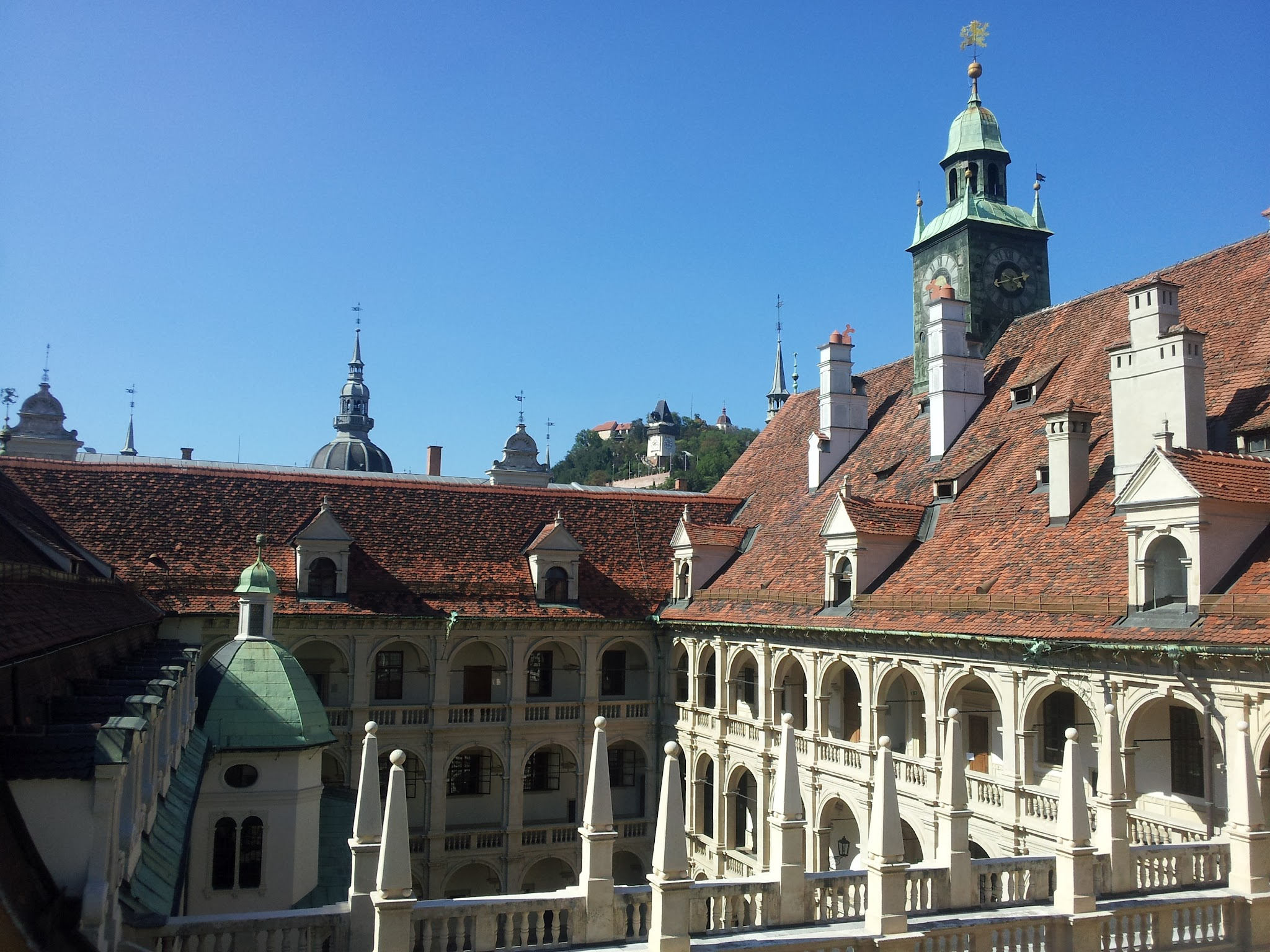 Landhaus in Graz, gesehen vom Zeughaus.